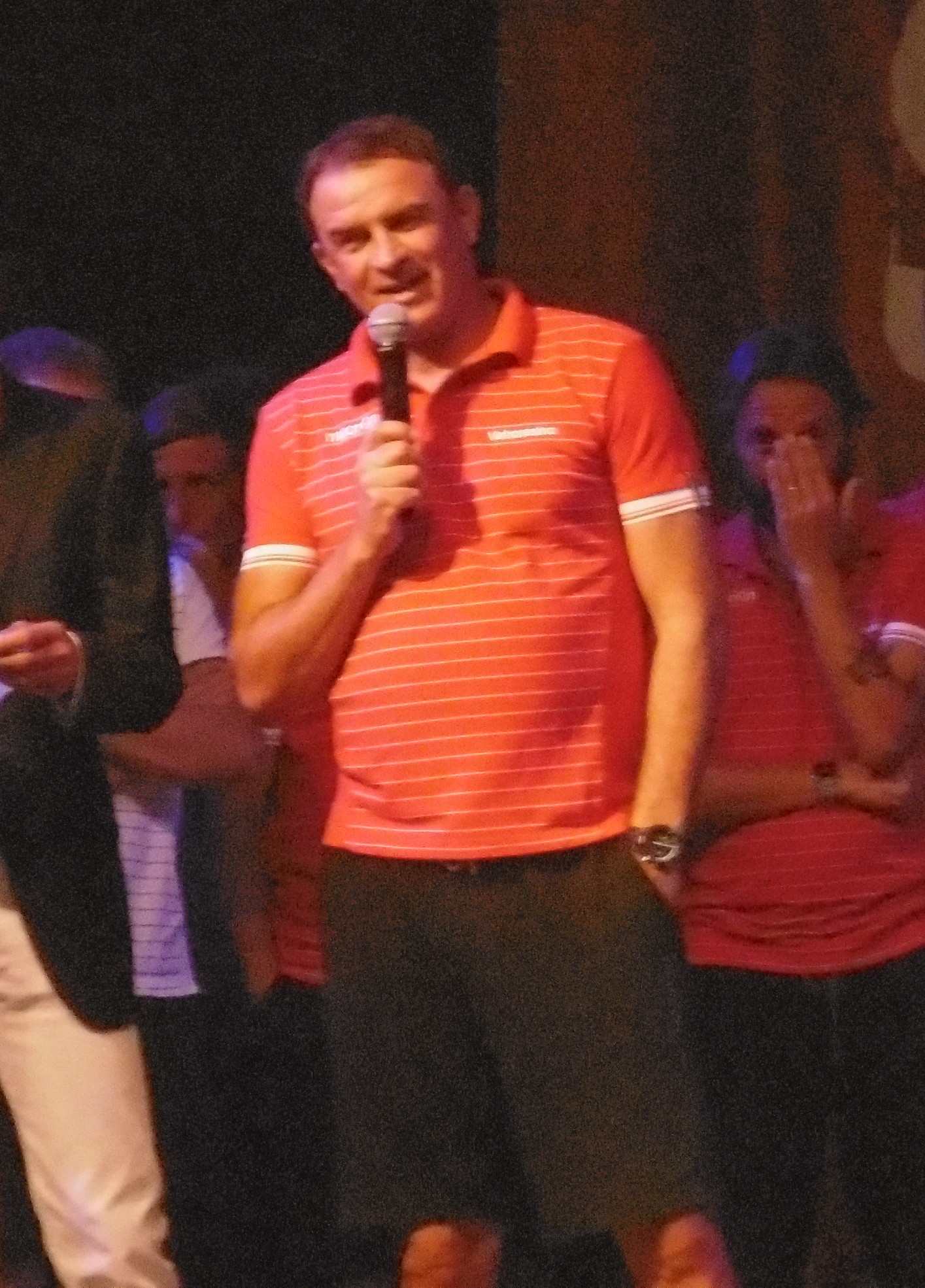 L'allenatore di calcio italiano Leonardo Semplici alla S.P.A.L.